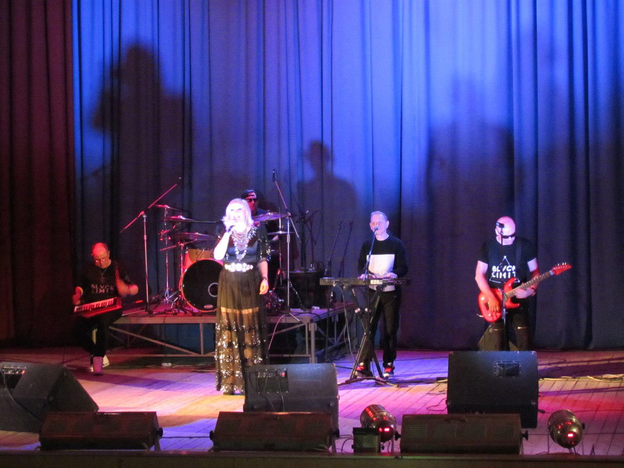 В Мелитополе